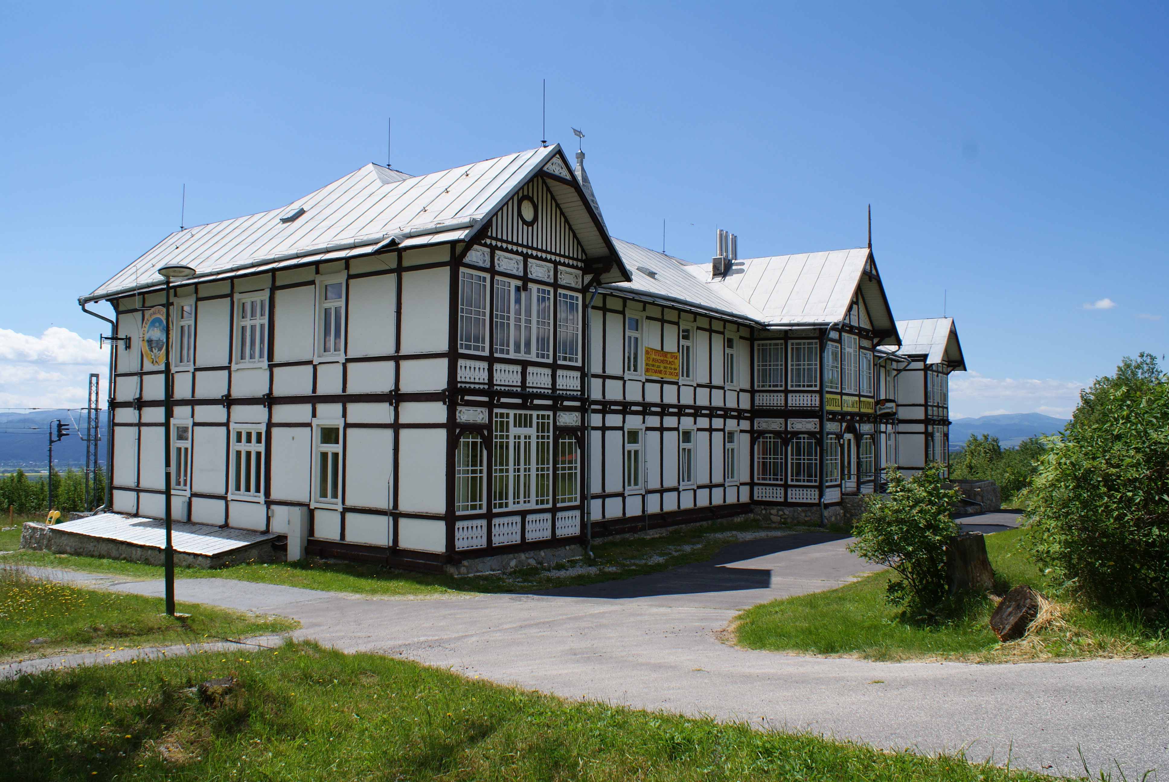 Hotel Tivoli Tatranská Polianka, národná kultúrna pamiatka